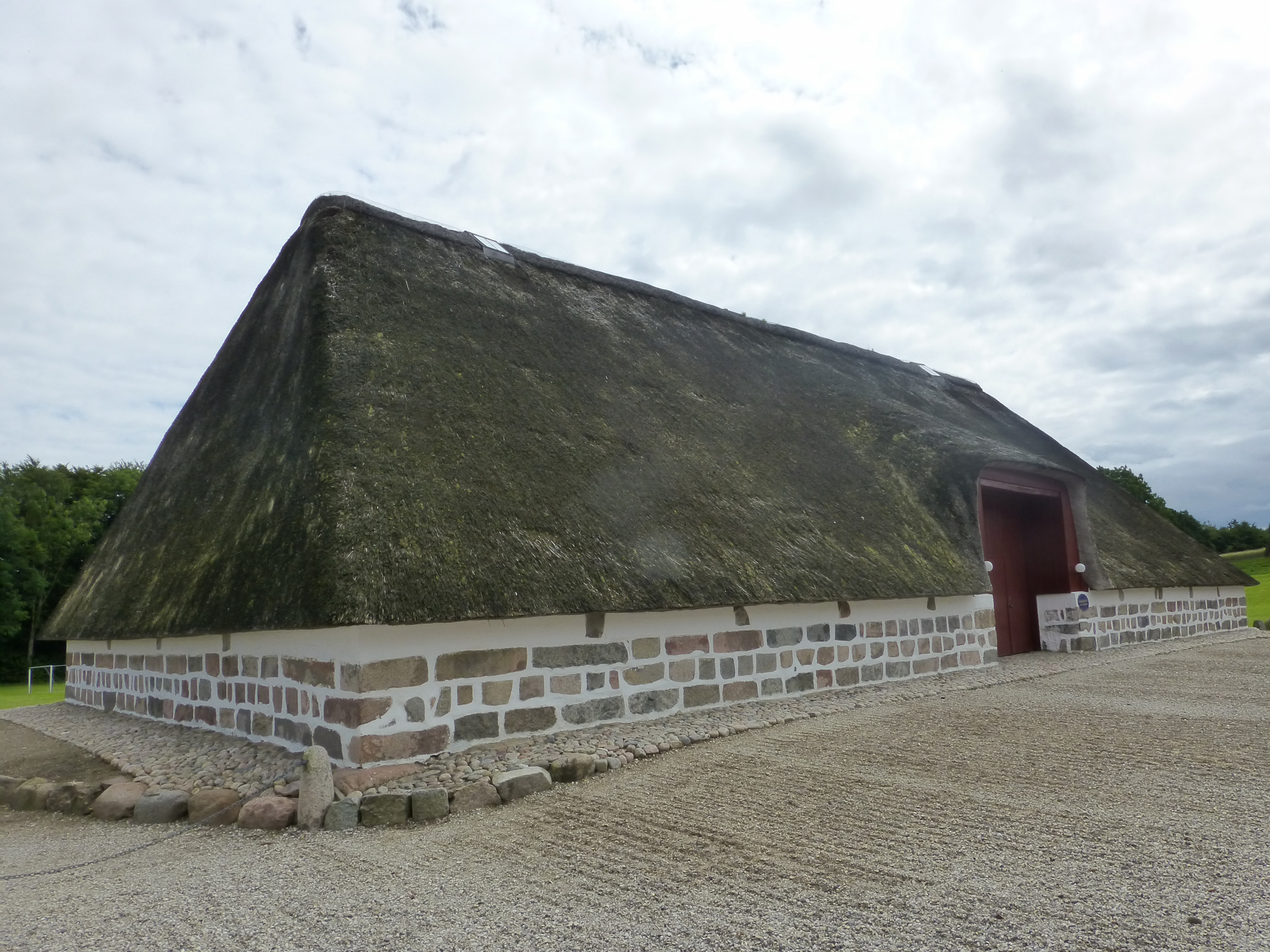 Uldrupgård - stubladen